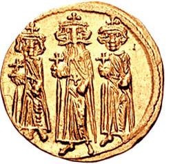 See File:Solidus-Heraclius-sb0764.jpg.